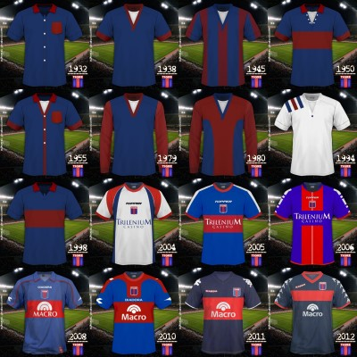 Diversas camisetas usadas por el Club en su historia